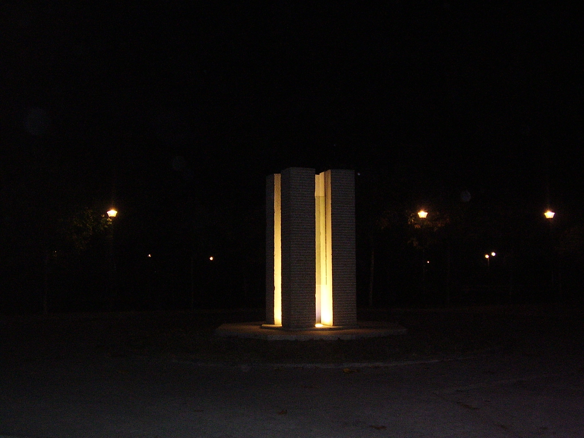 cesantes